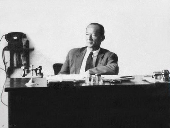 Leonardo Yuta Caceres, destacado periodista, poeta y declamador peruano